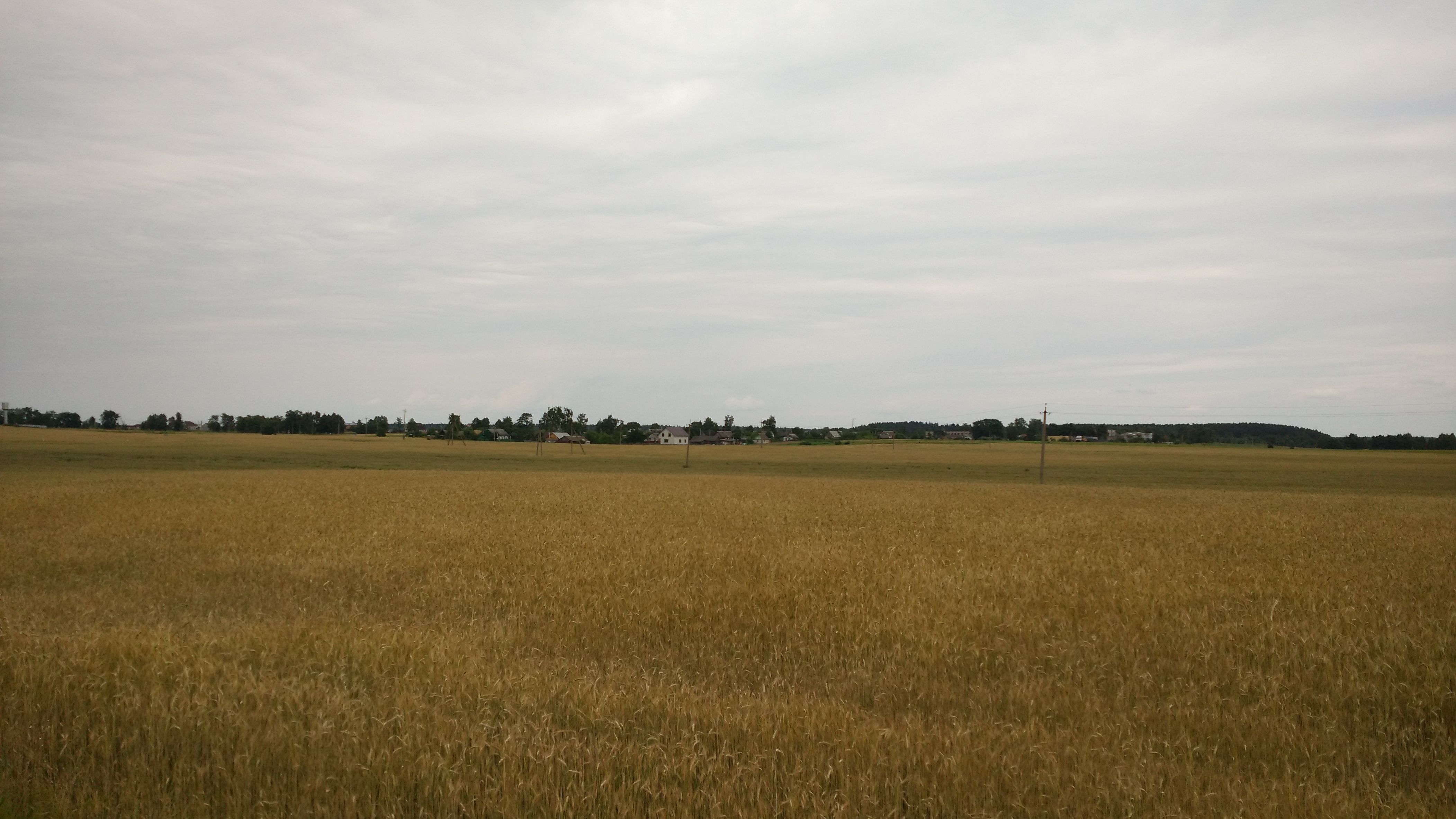 Вёска Узляны, Пухавіцкі раён. Від з боку дарогі на Азярычына.